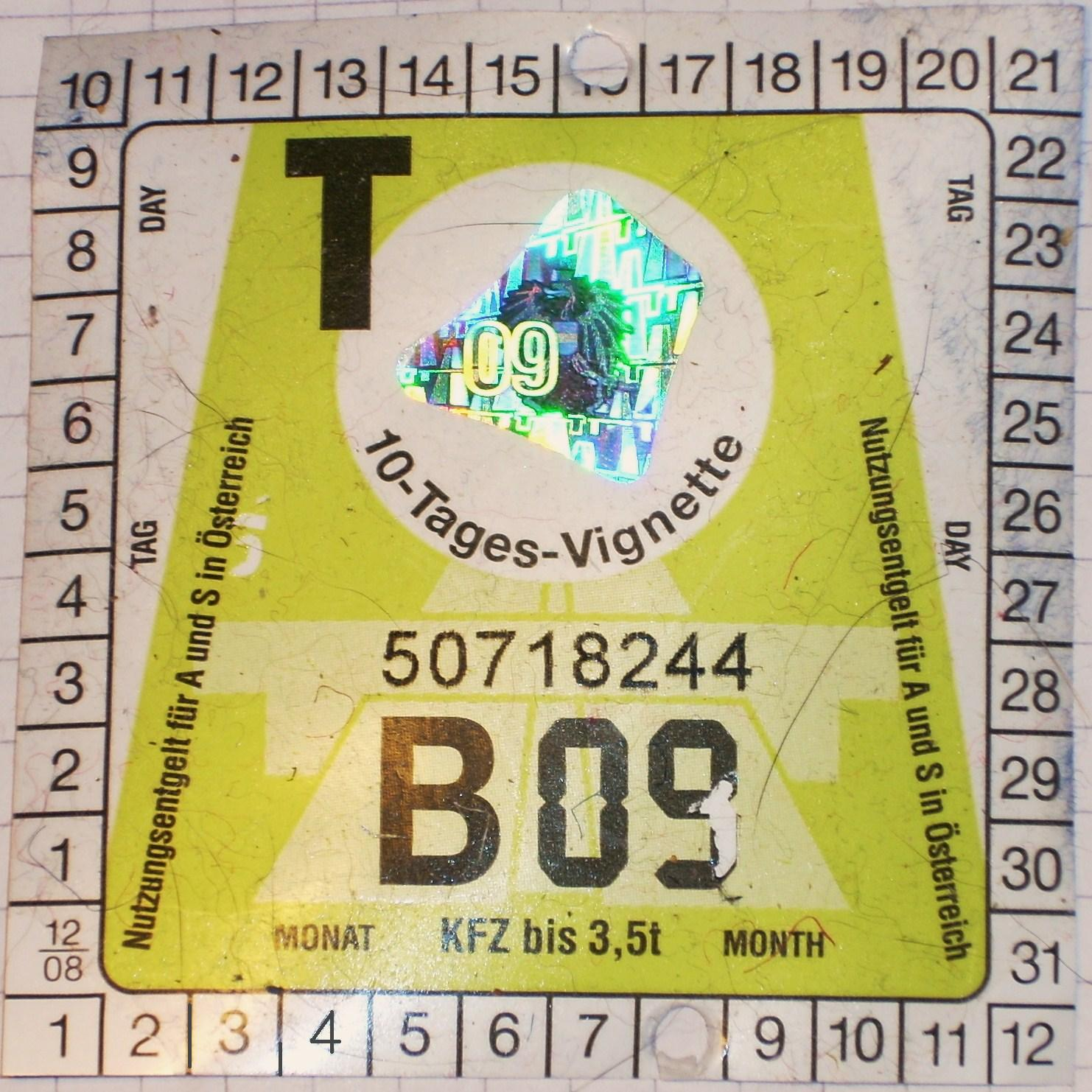 10 Tages Vignette für Autobahnen von Österreich